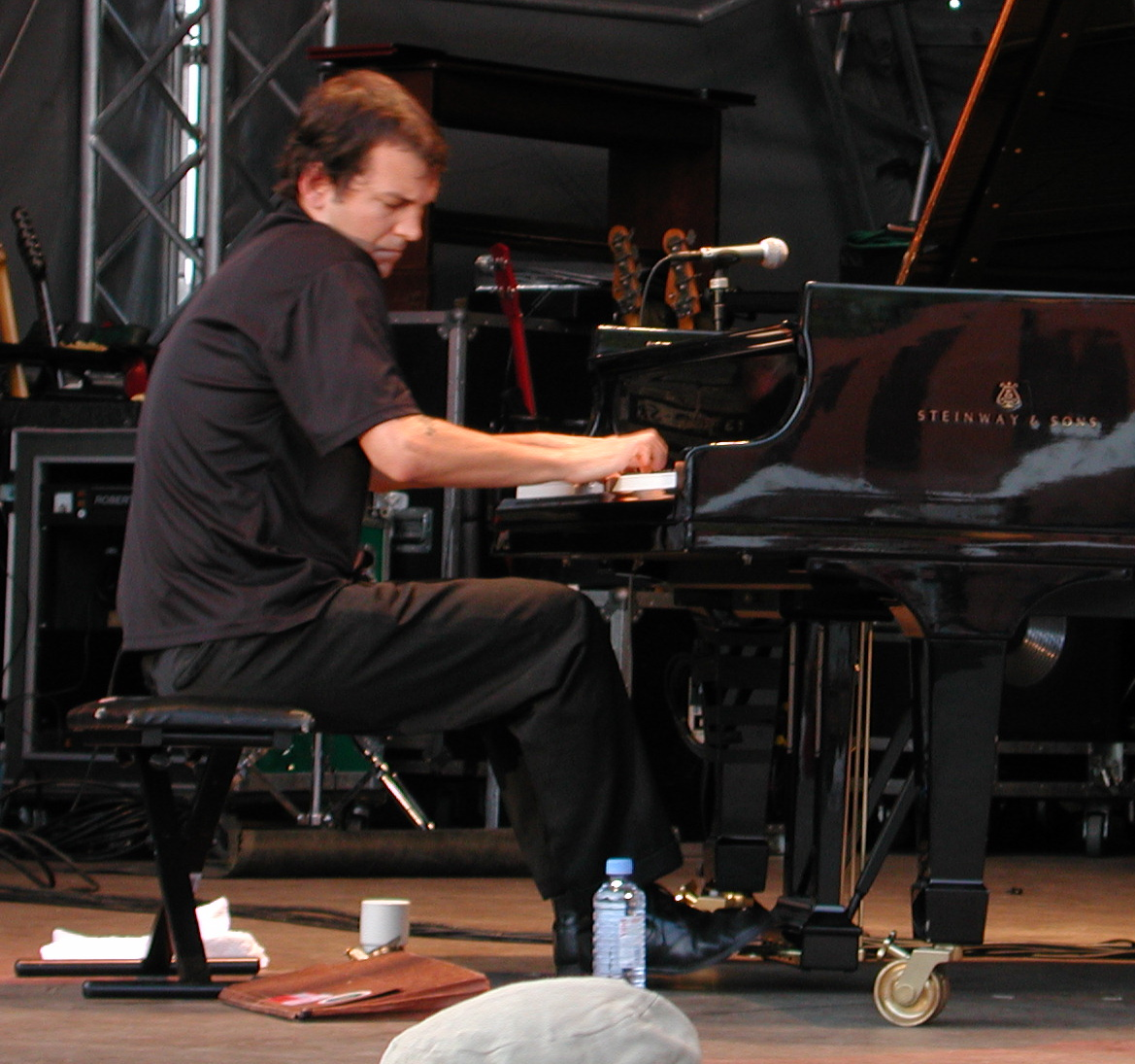 Brad Mehldau selbst fotografiert am 20.7.2001